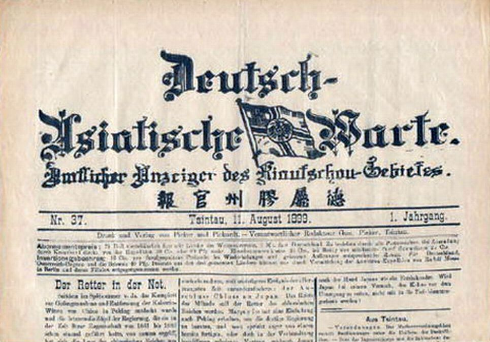 德属胶州官报1899年8月11日 第37期